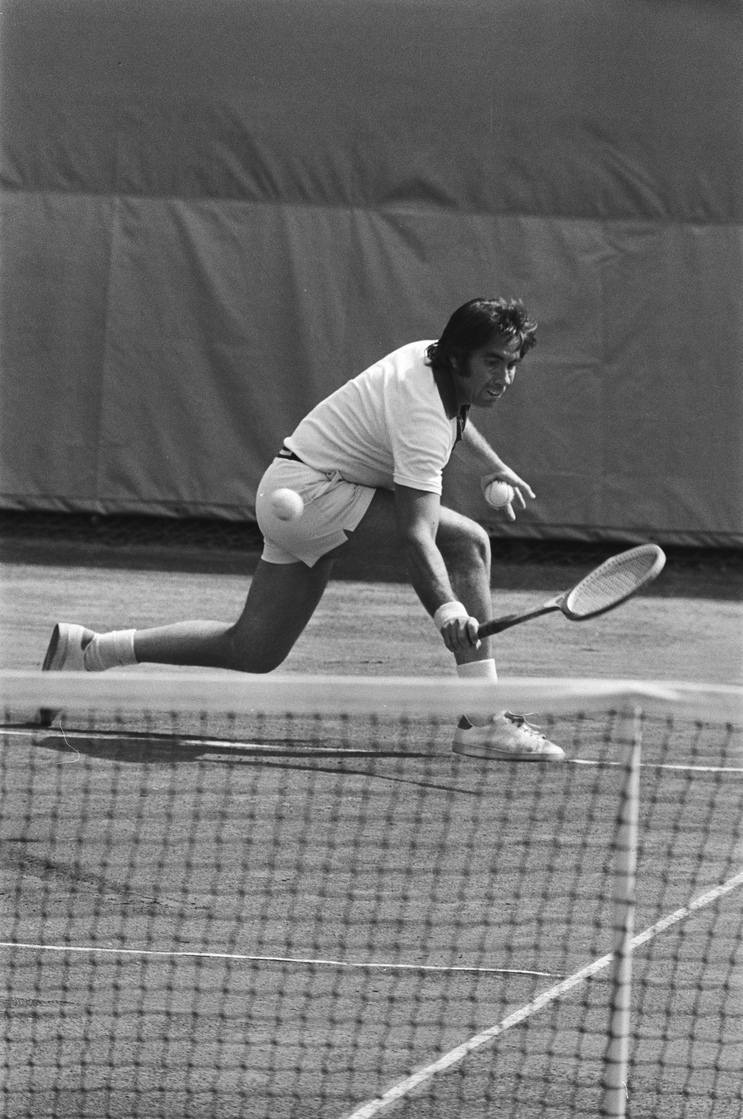 Collectie / Archief : Fotocollectie Anefo Reportage / Serie : [ onbekend ] Beschrijving : Tenniskampioenschappen Melkhuisje, Santana in aktie Datum : 14 juli 1976 Trefwoorden : tennis Instellingsnaam : Melkhuisje, 't Fotograaf : Peters, Hans / Anefo Auteursrechthebbende : Nationaal Archief Materiaalsoort : Negatief (zwart/wit) Nummer archiefinventaris : bekijk toegang 2.24.01.05 Bestanddeelnummer : 928-6928